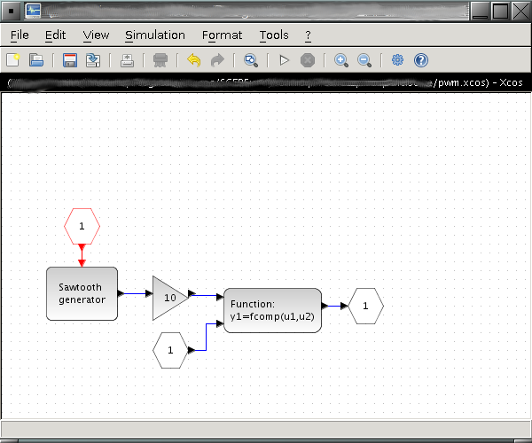 Bloque en Xcos para generar una señal PWM.